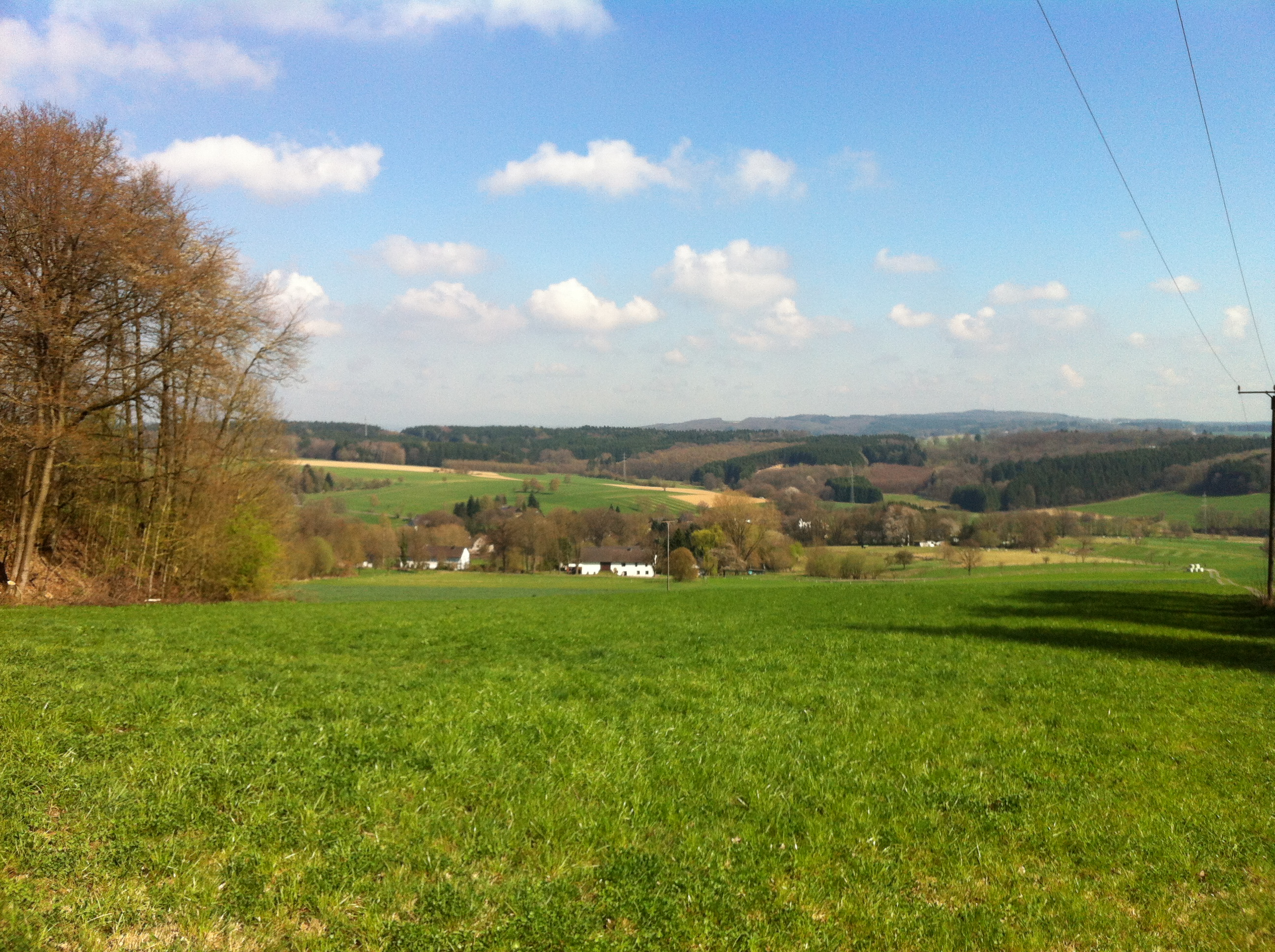 Altenkirchener Hochfläche bei Hilkhausen